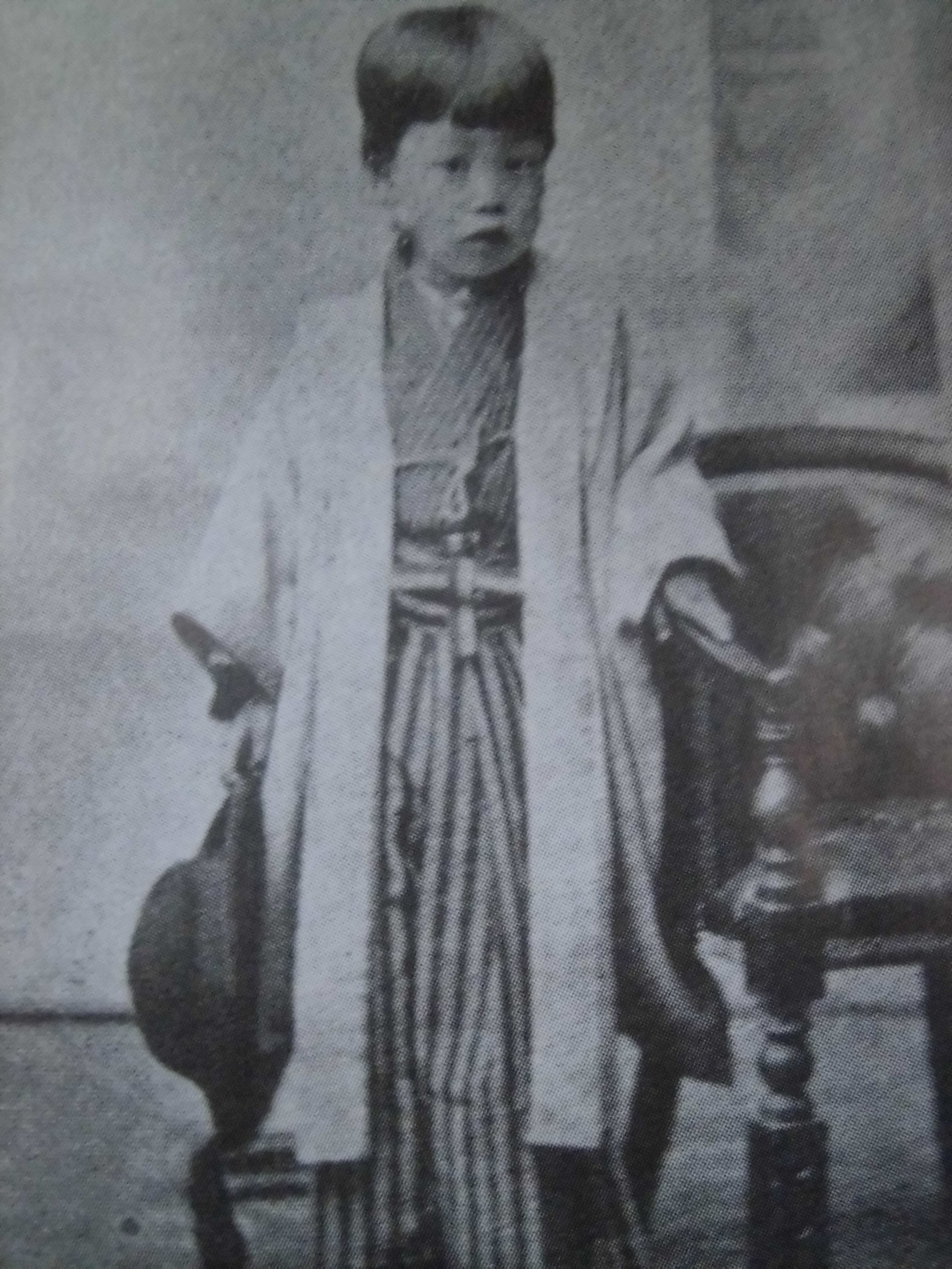 6歳のときの永井荷風